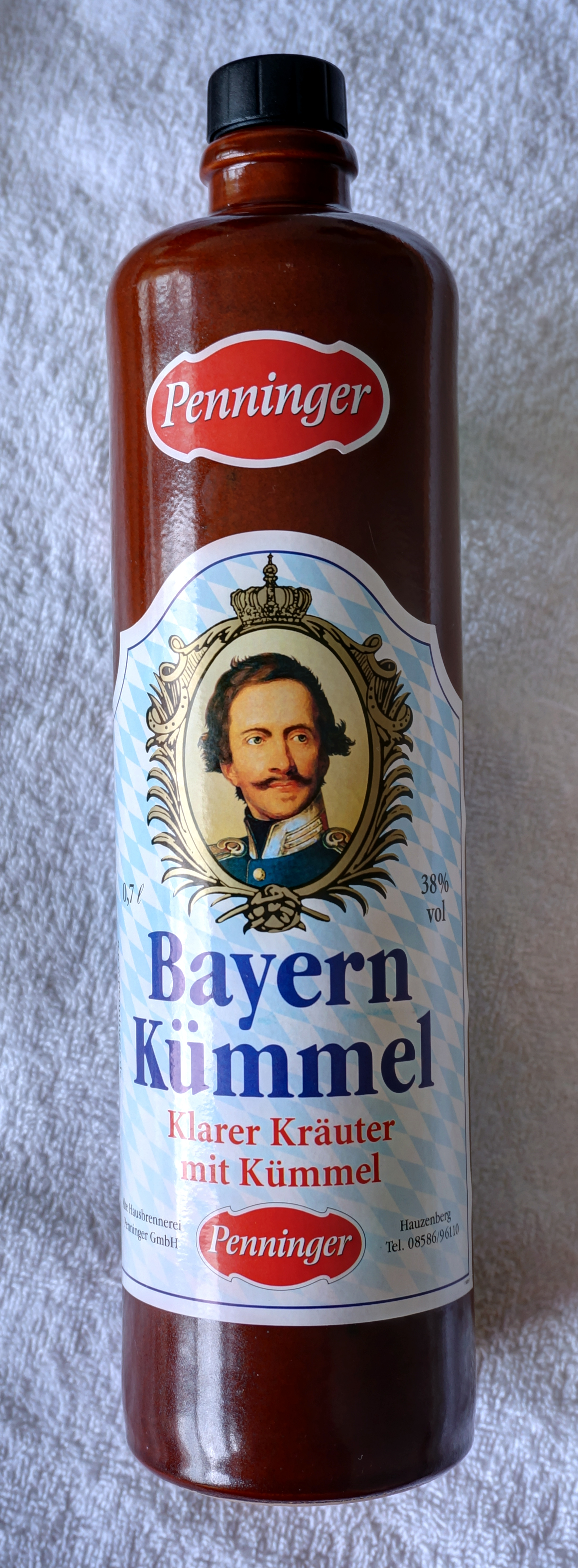 klarer Kümmelschnaps der Firma Penninger mit der Bezeichnung Bayern Kümmel, 0,7 Liter, 38% vol., mit Fenschel, Anis und anderen Kräutern mit einer Abbildung von König Ludwig I von Bayern nach einem Gemälde von Joseph Karl Stieler (1781 - 1858)